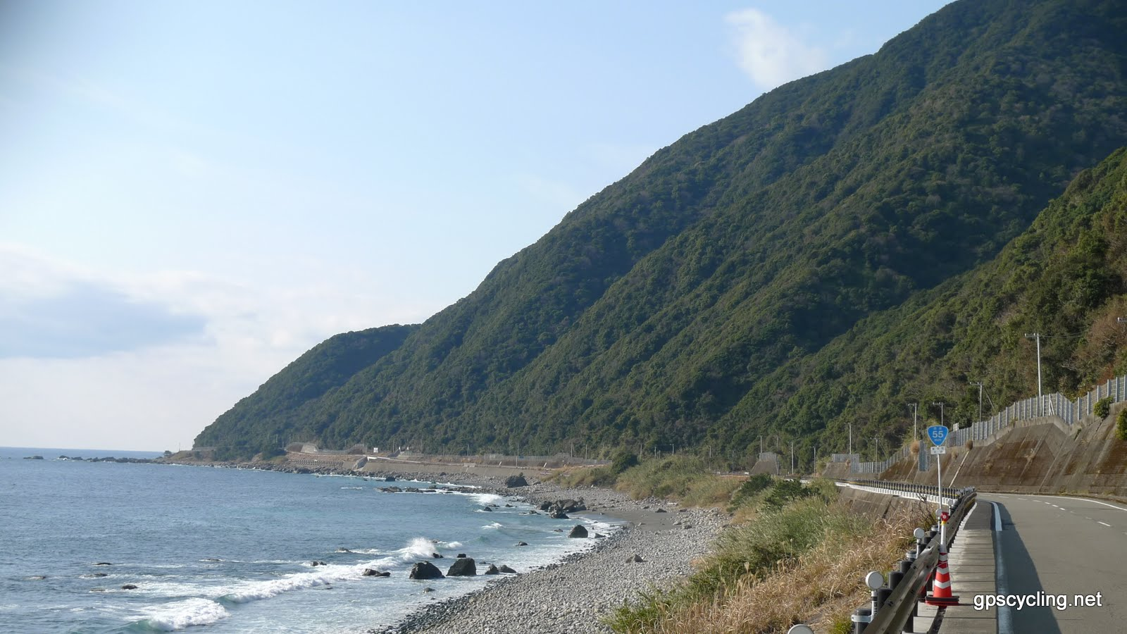 土佐東街道